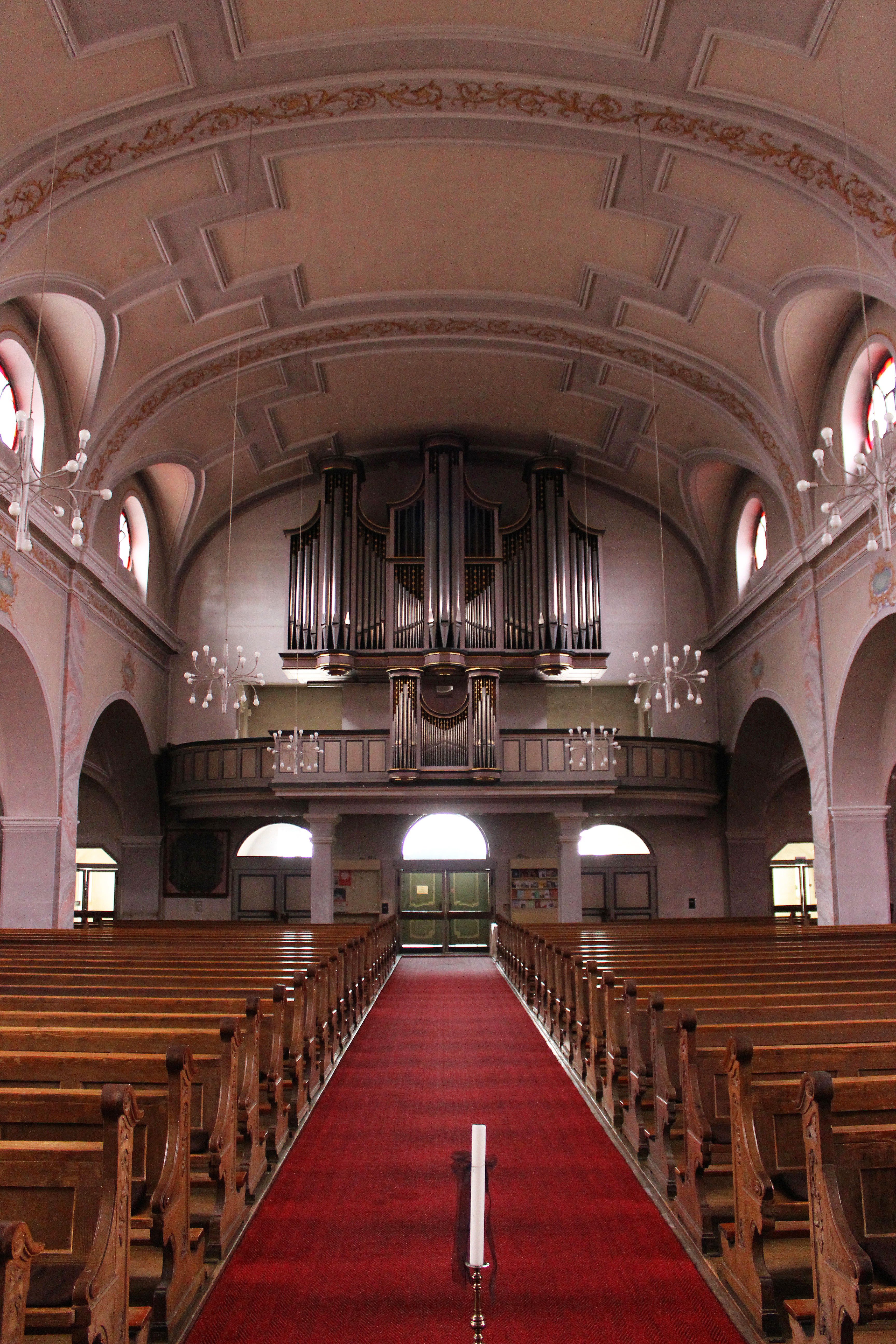 Blick ins Innere der katholischen Pfarrkirche St. Laurentius in Hülzweiler, einem Ortsteil der Gemeinde Schwalbach, Landkreis Saarlouis, Saarland